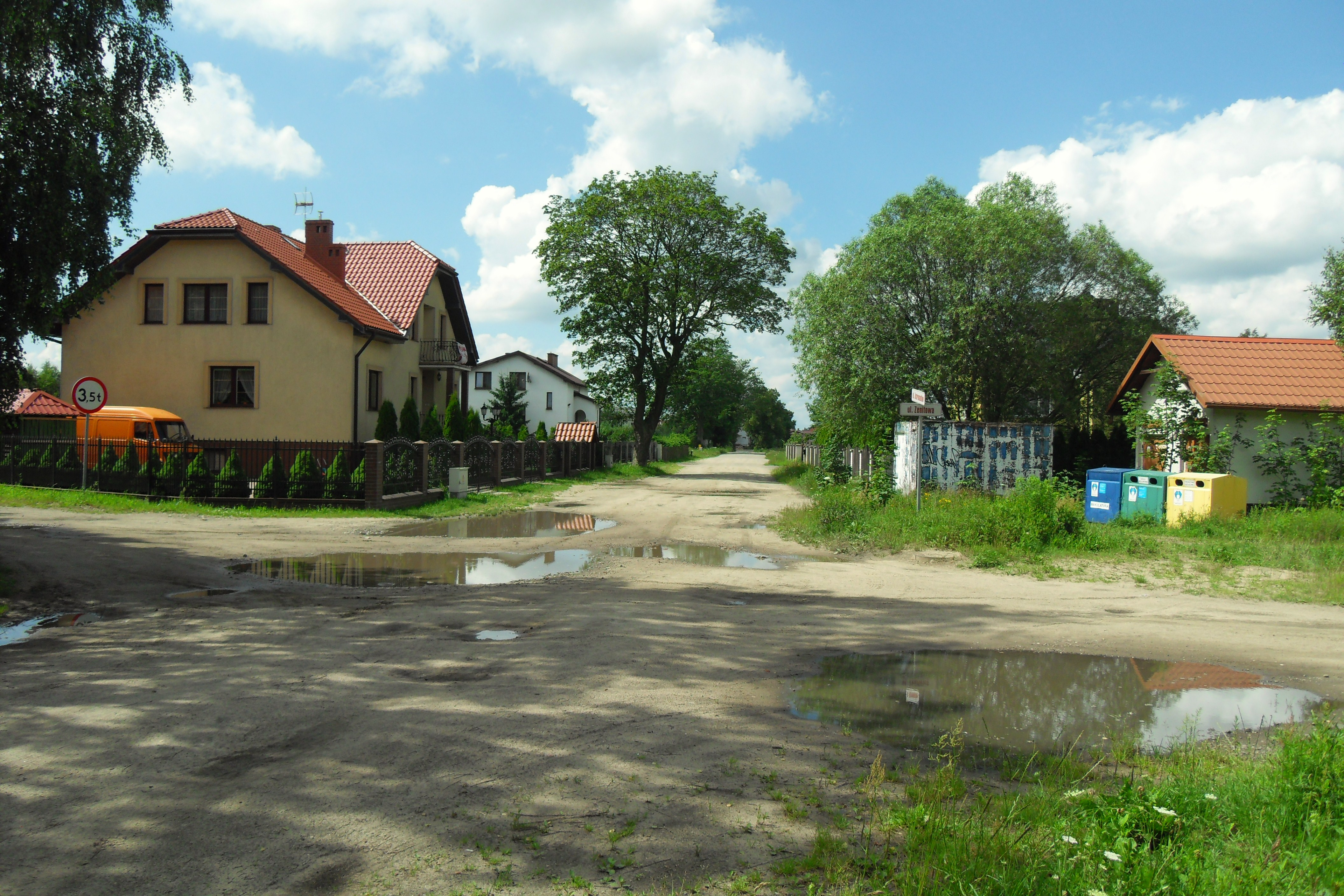 Gdańsk Klukowo, skrzyżowanie ul. Astronautów i ul. Zenitowej.